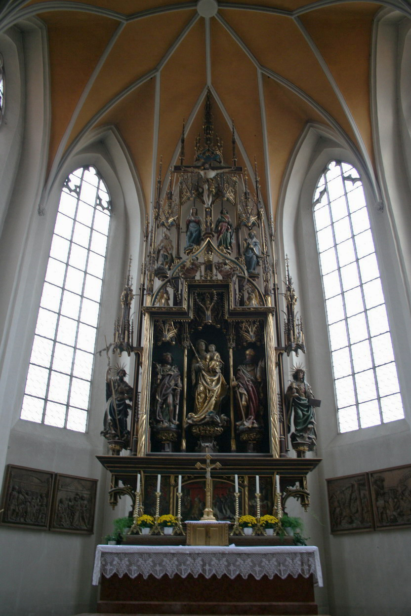 Hochaltar des Kastulusmünsters in Moosburg an der Isar